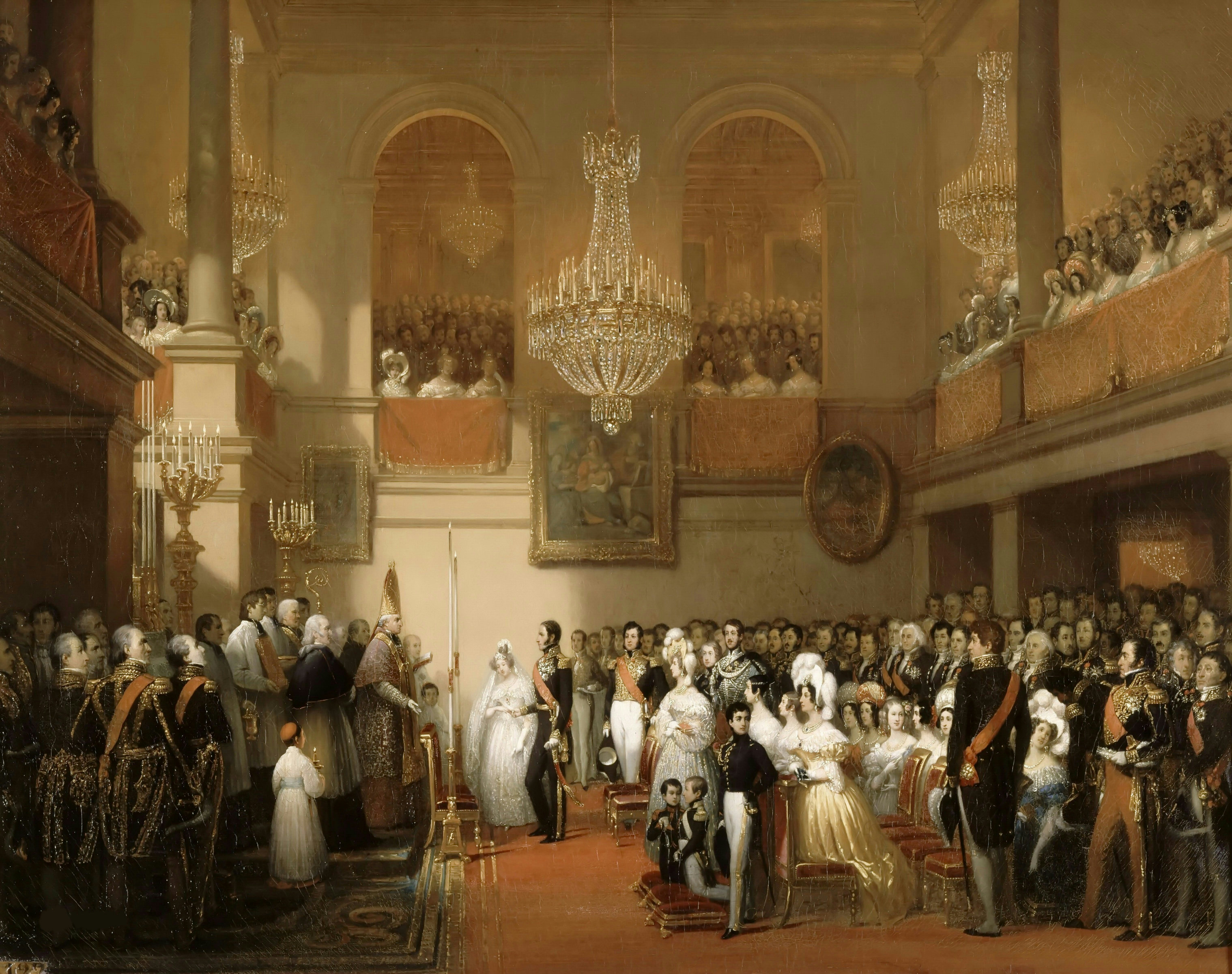 Бракосочетание Леопольда I и принцессы Луизы Орлеанской в замке Компьень в 1832 году